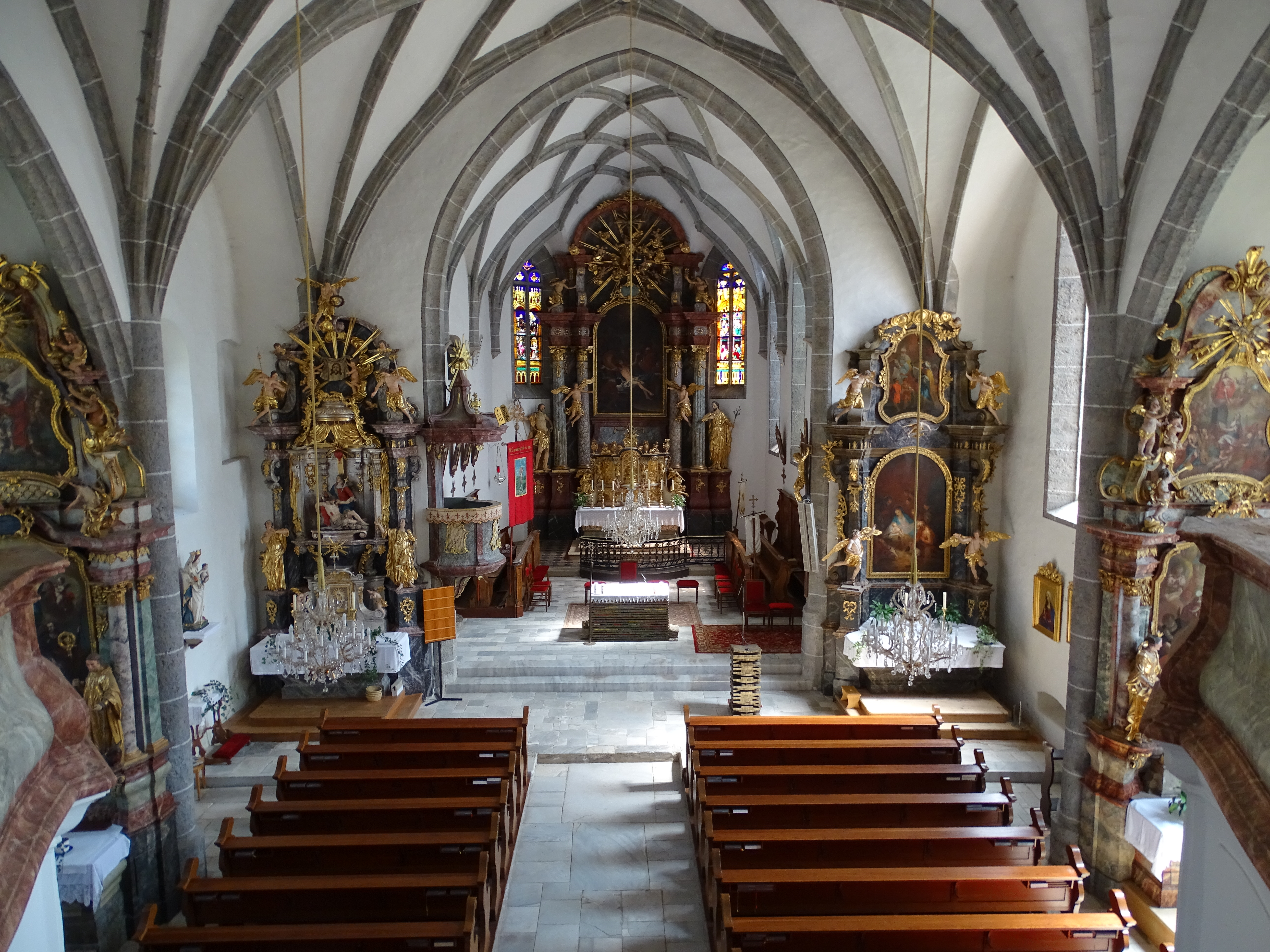 Blick von der Orgelempore auf den Innenraum mit dem Hochaltar der Pfarrkirche Übelbach